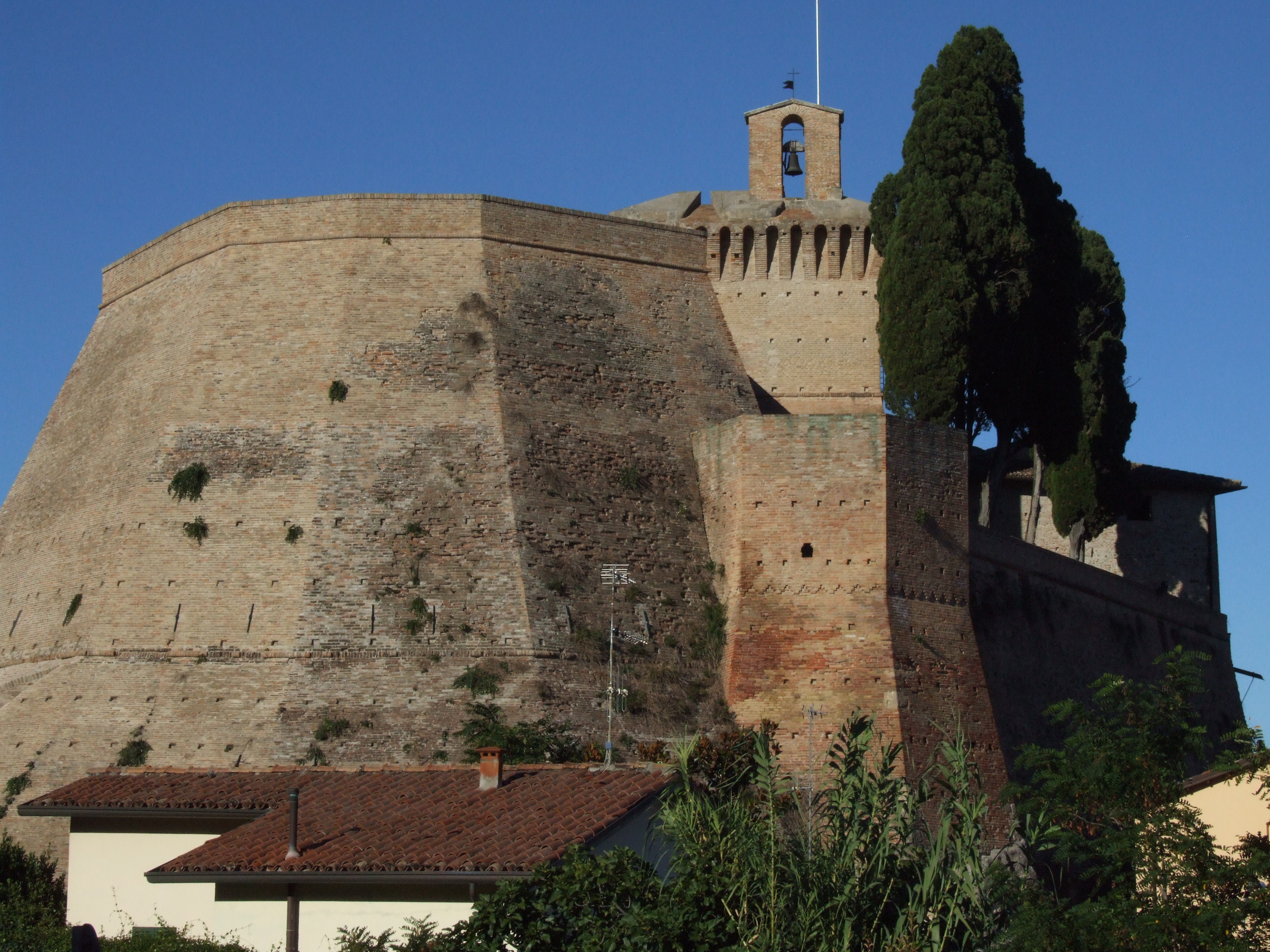 Rocca di Meldola This is a photo of a monument which is part of cultural heritage of Italy.